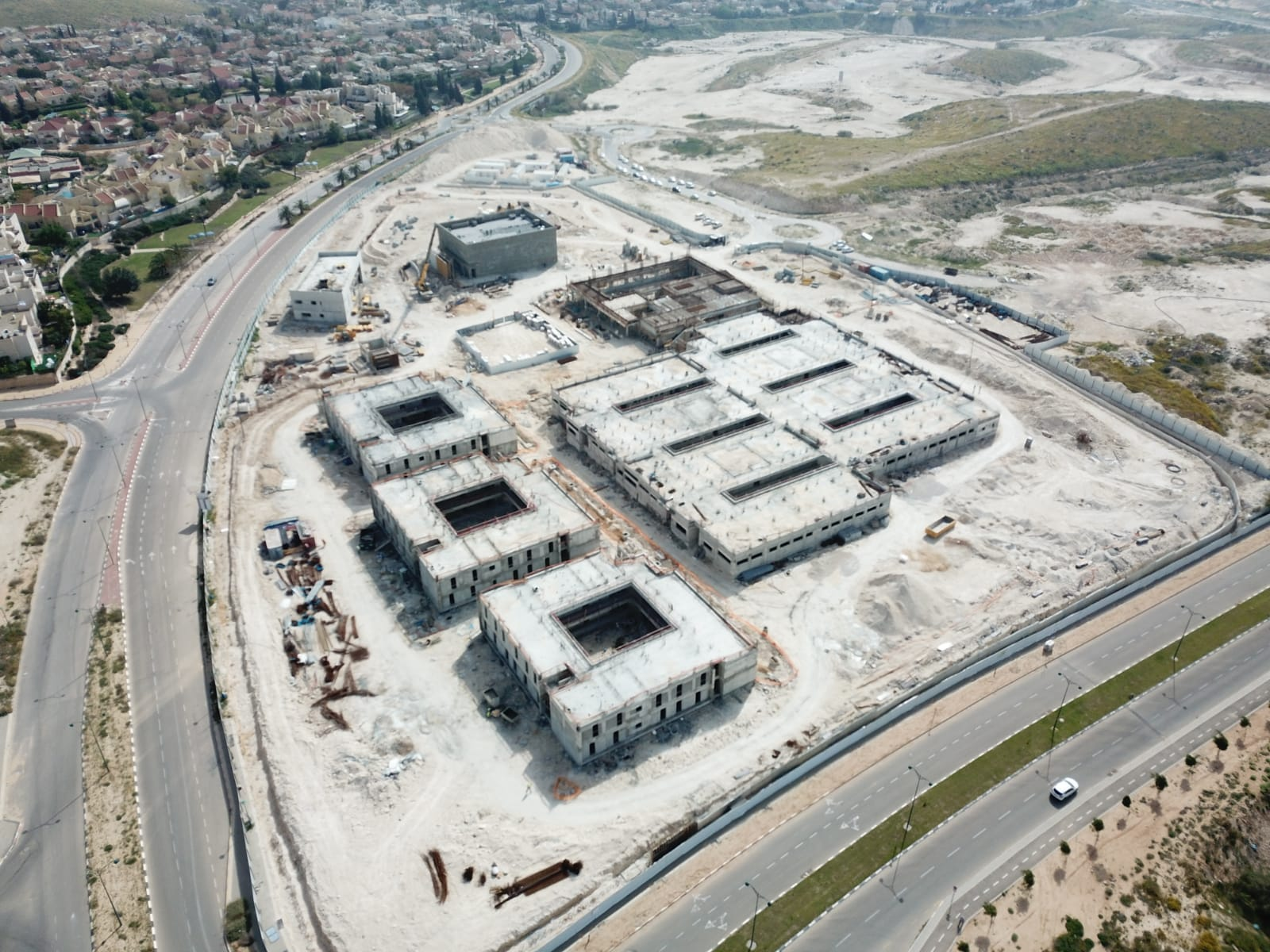 ביקור הרמטכ"ל, רא"ל אביב כוכבי, בסיסים בבאר שבע, לקראת המשך מימוש המעבר לנגב של יחידות צה"ל.